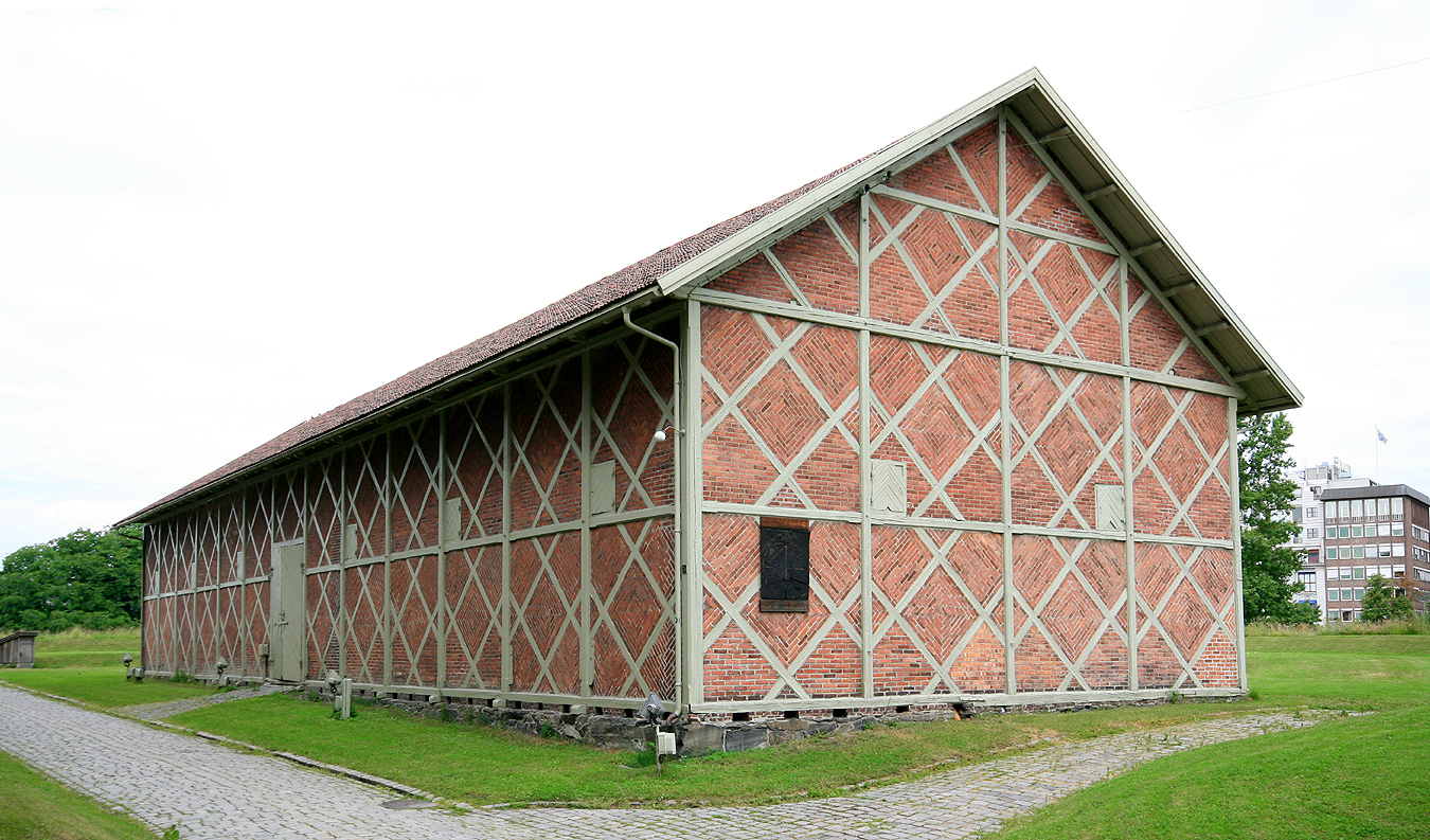 Høymagasinet, Akershus festning, Oslo. Bygd 1845. Arkitekt var Christian Herman Malling. Huser i dag Oslo bymodell.